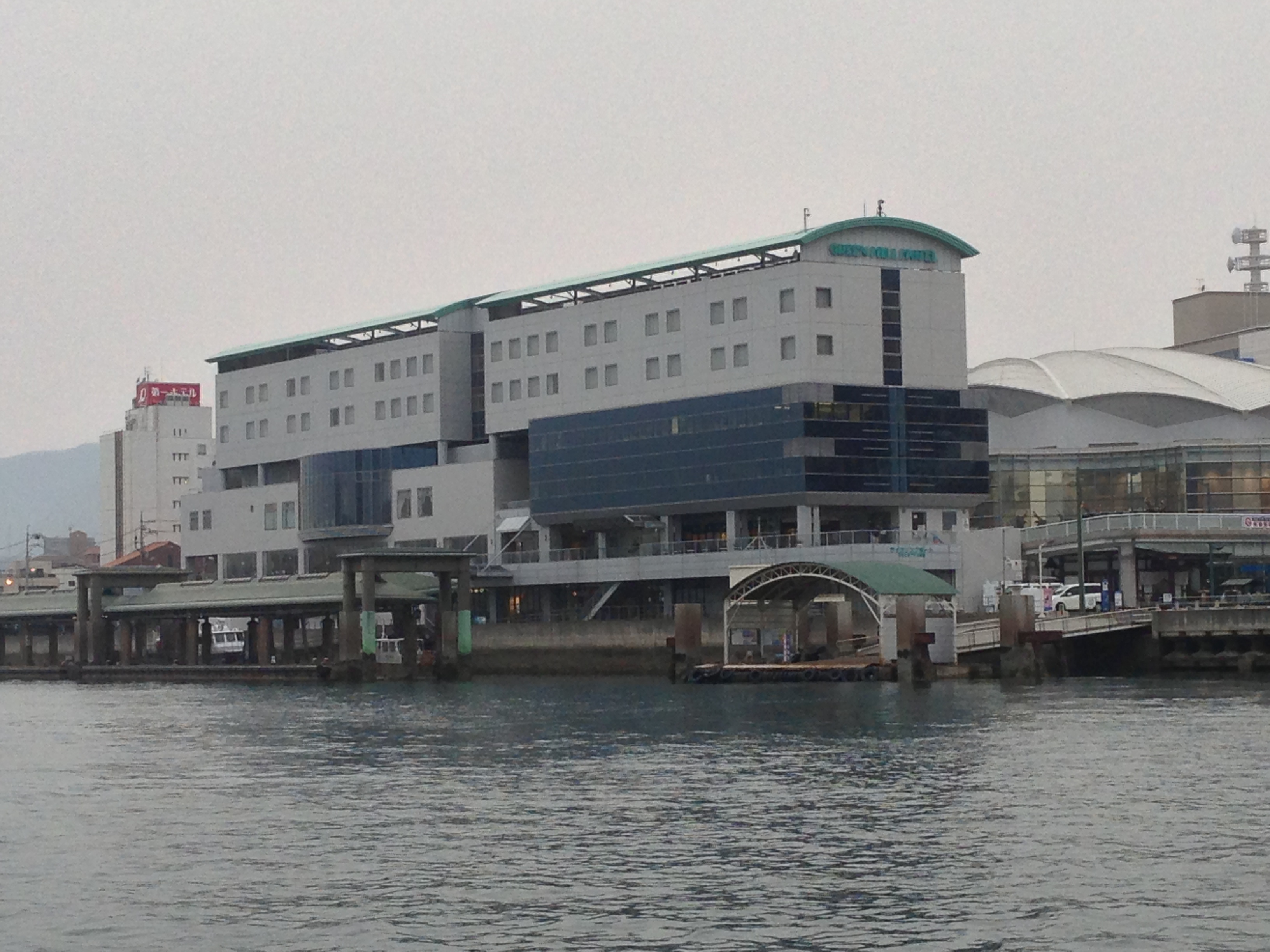 尾道港とグリーンヒルホテル尾道